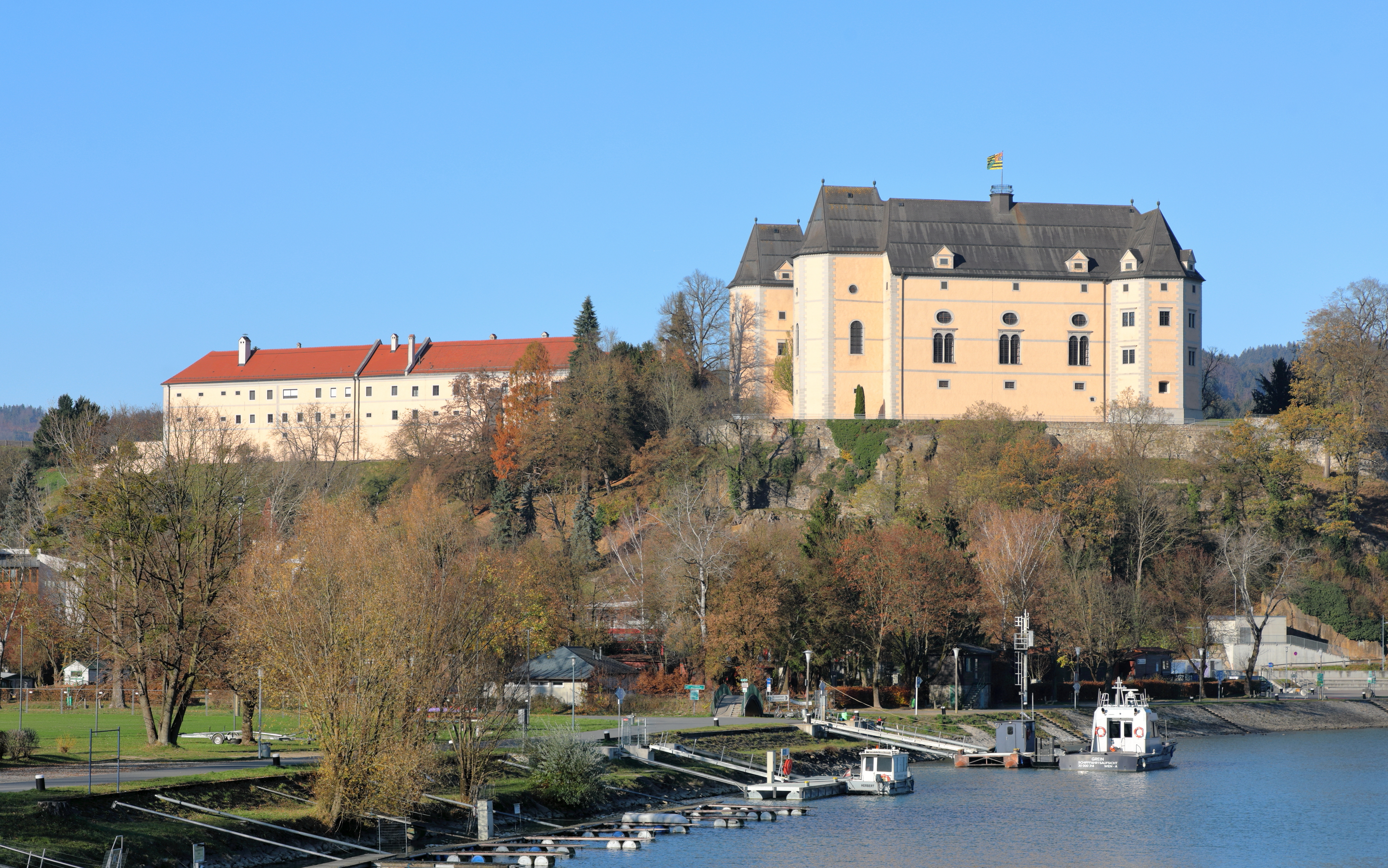 Südansicht der Schlossanalge Greinburg in der oberösterreichischen Stadtgemeinde Grein. Links der dreiflügelige Wirtschaftshof bzw. Meierhof und rechts das spätgotische vierflügelige Schlossgebäude in beherrschender Lage, unmittelbar an der Donau im Strudengau.